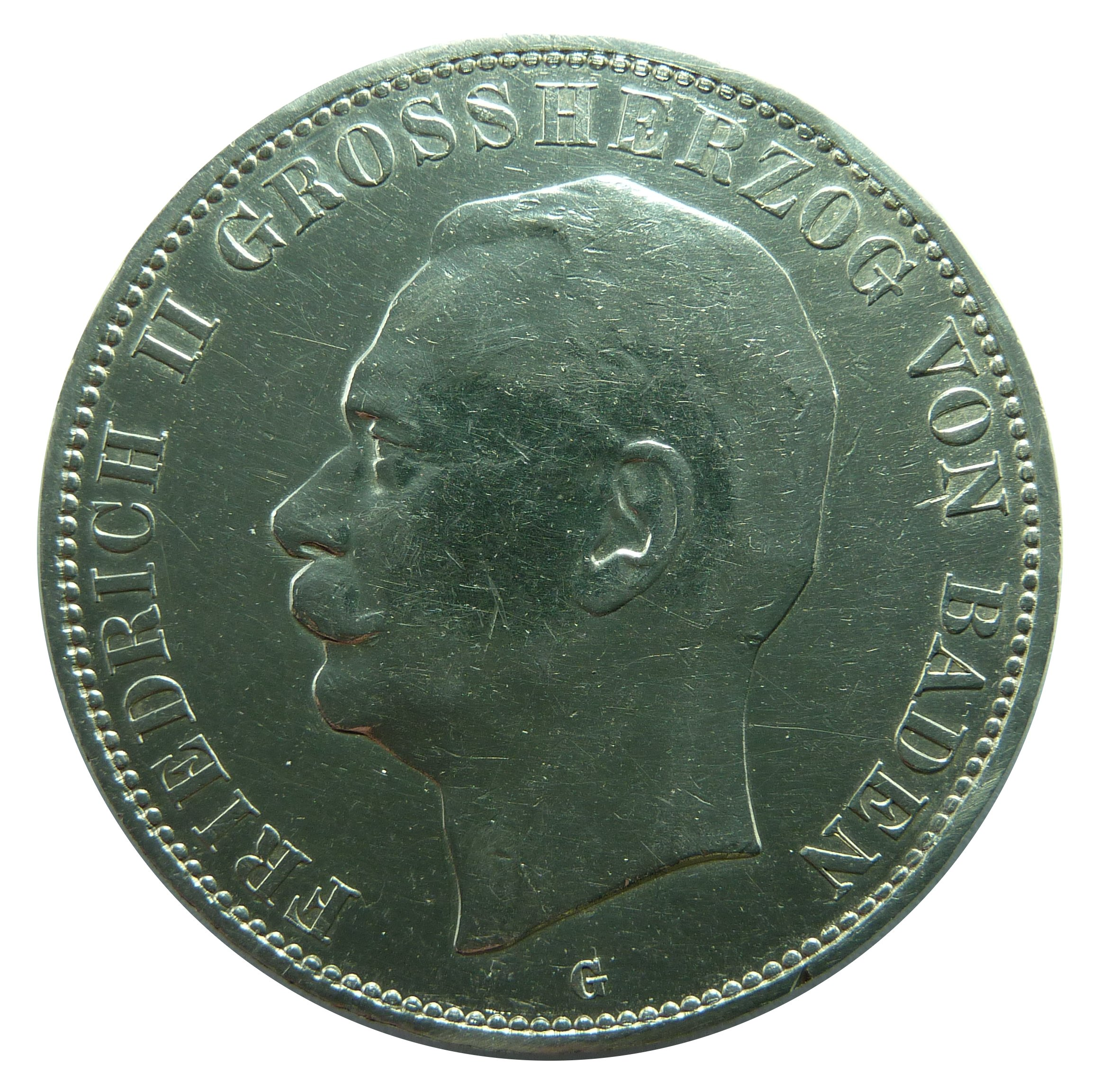 Vorderseite der 5-Mark-Münze des Großherzogtums Baden mit dem Porträt des Großherzogs Friedrich II.